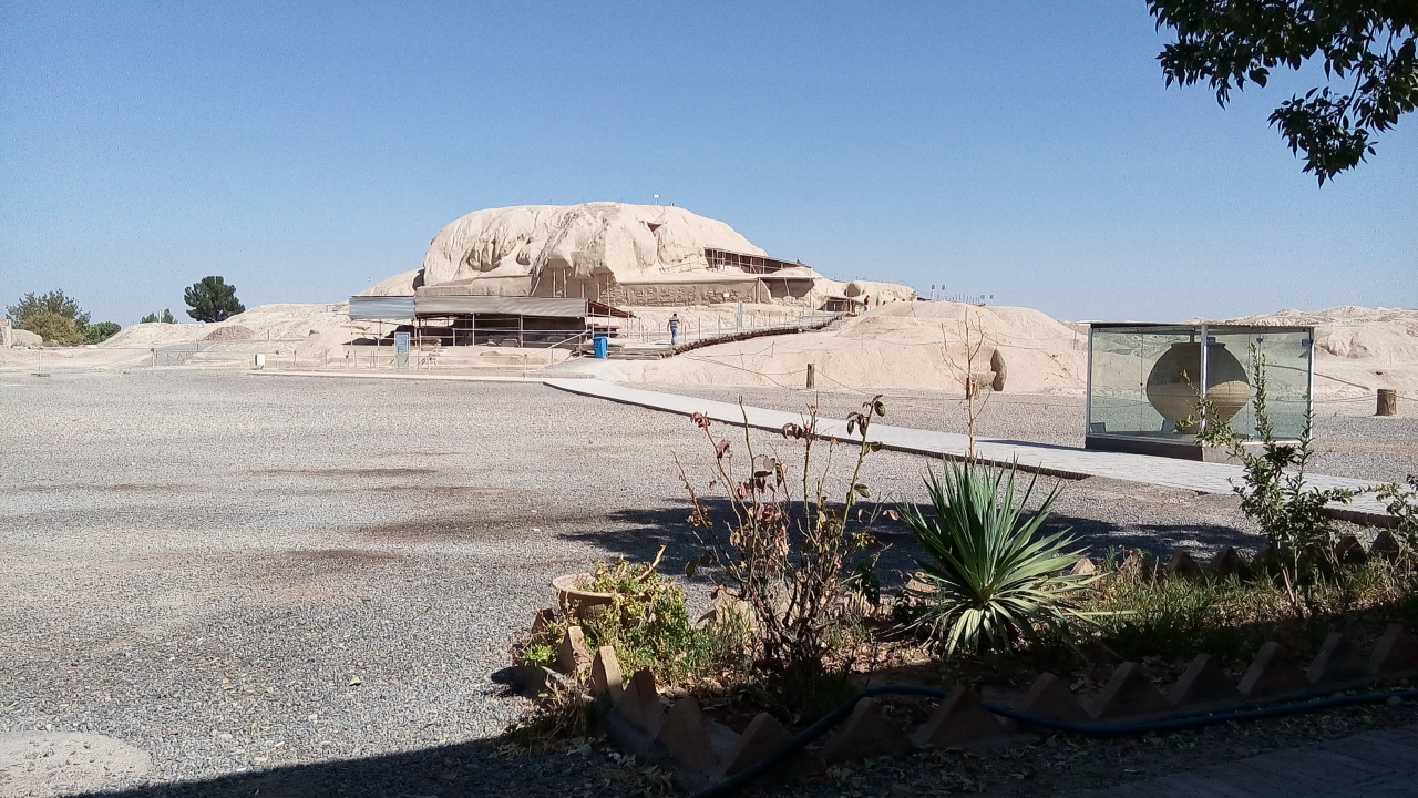 مکان و اطراف یک معبد (تپه سیلک)